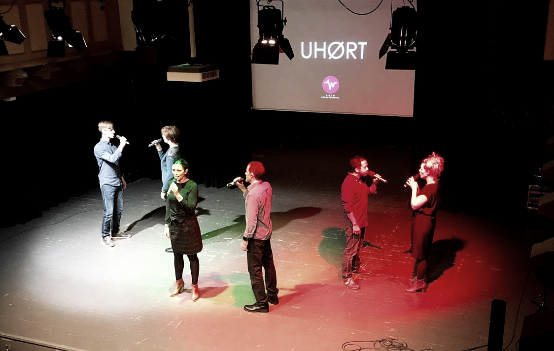 Vokalgruppa på scenen, OVF 18